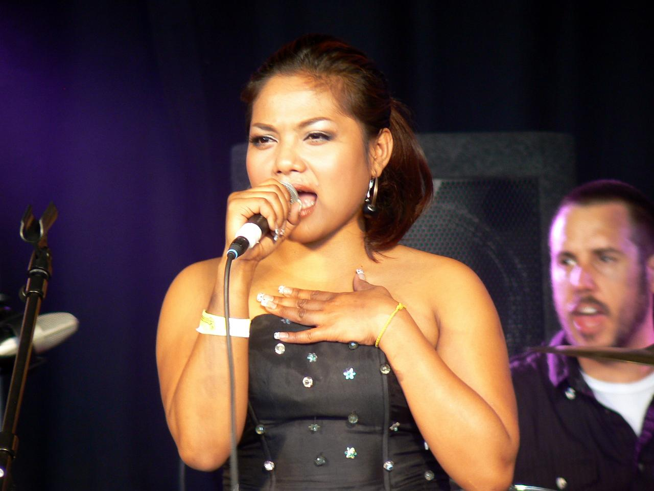 Festival deBeschaving in Utrecht op 30 augustus 2008